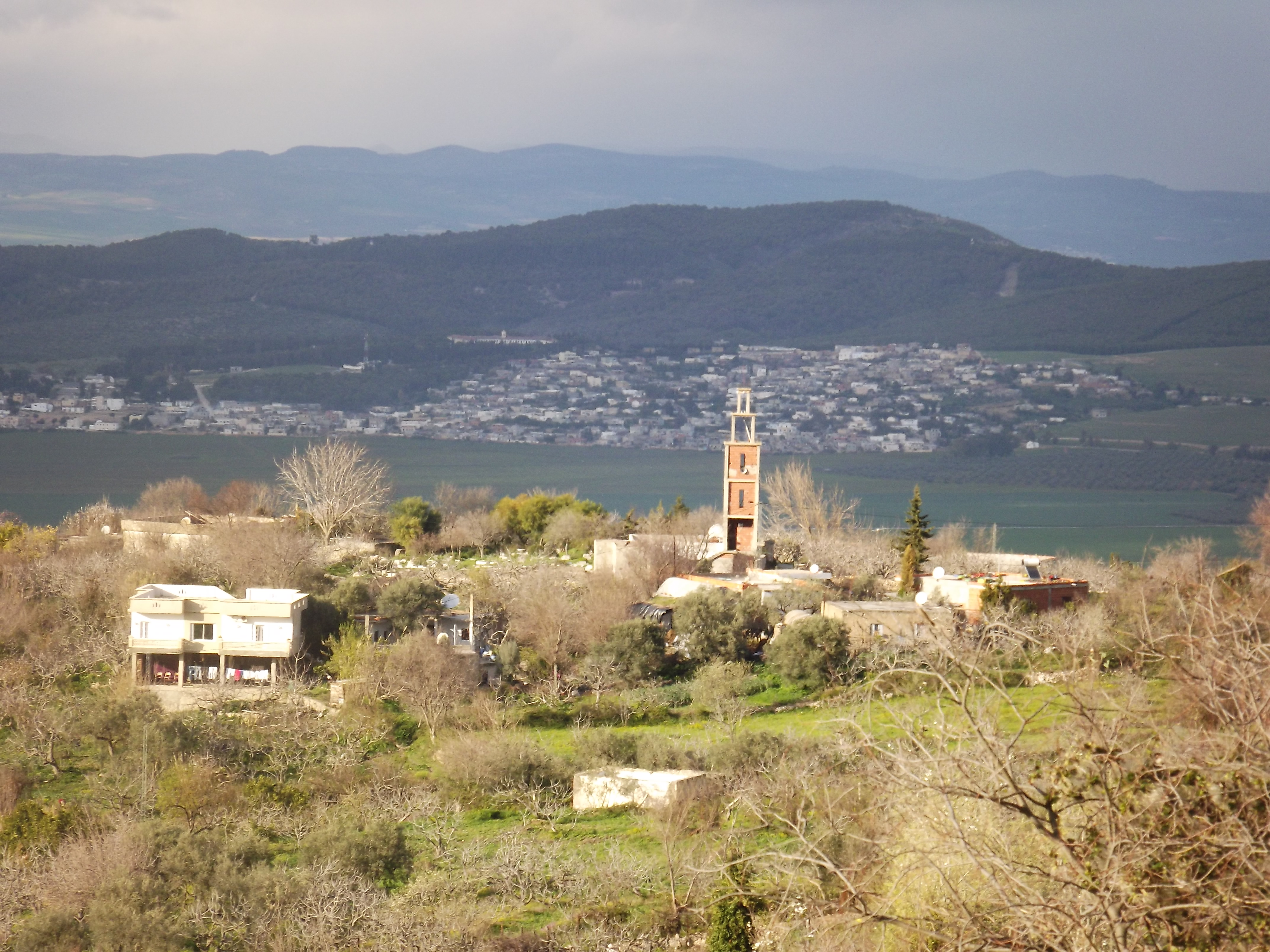 Site naturel de Djebba